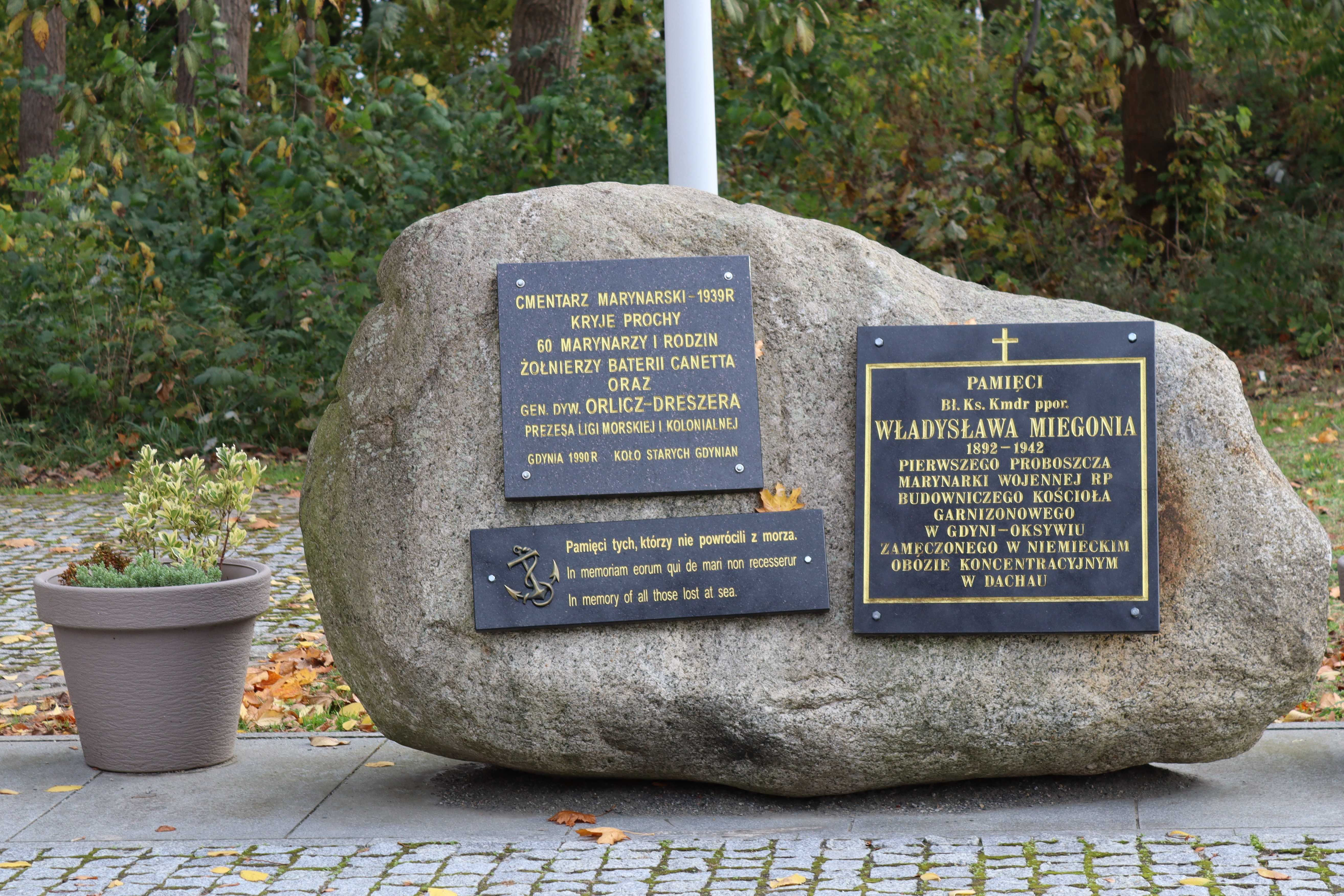 Cmentarz Marynarki Wojennej. Obelisk poświęcony żołnierzom baterii Canett, gen. Orlicz-Dreszerowi oraz ks. kmdr. ppor. Miegoniowi